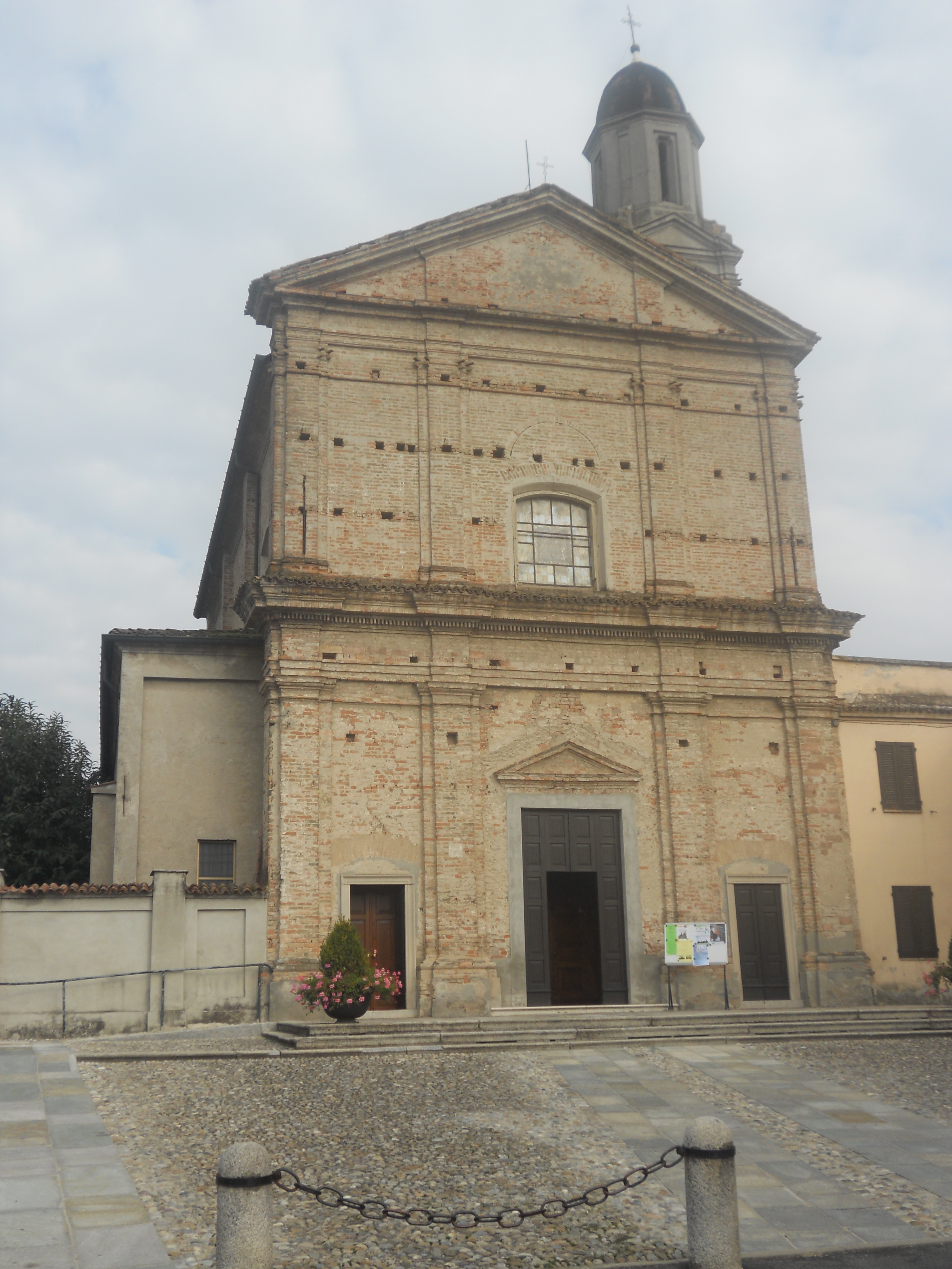 Ripalta Arpina: la chiesa parrocchiale di Santa Maria Rotonda.